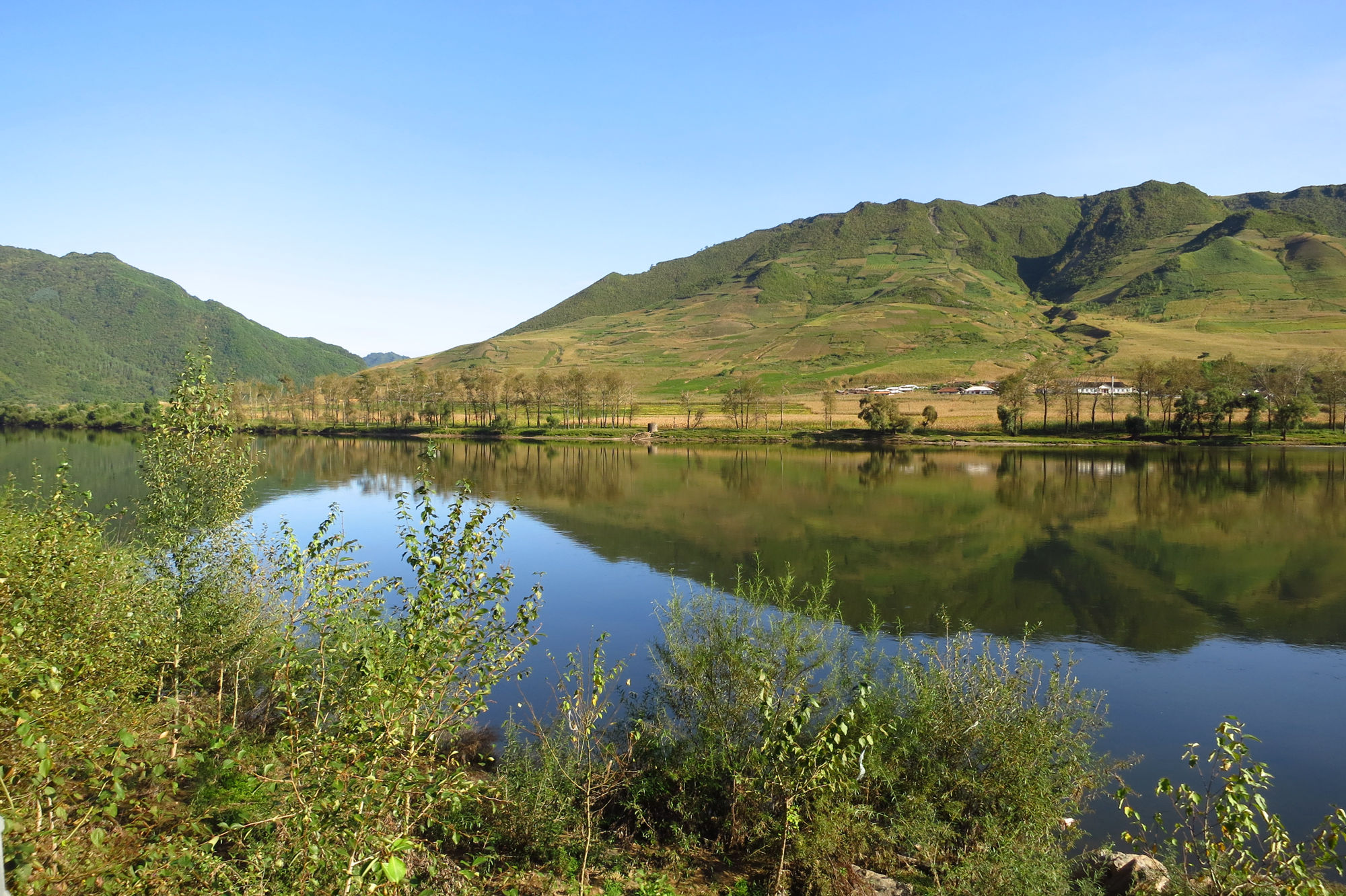 巡道工出品 Photo by Xundaogong